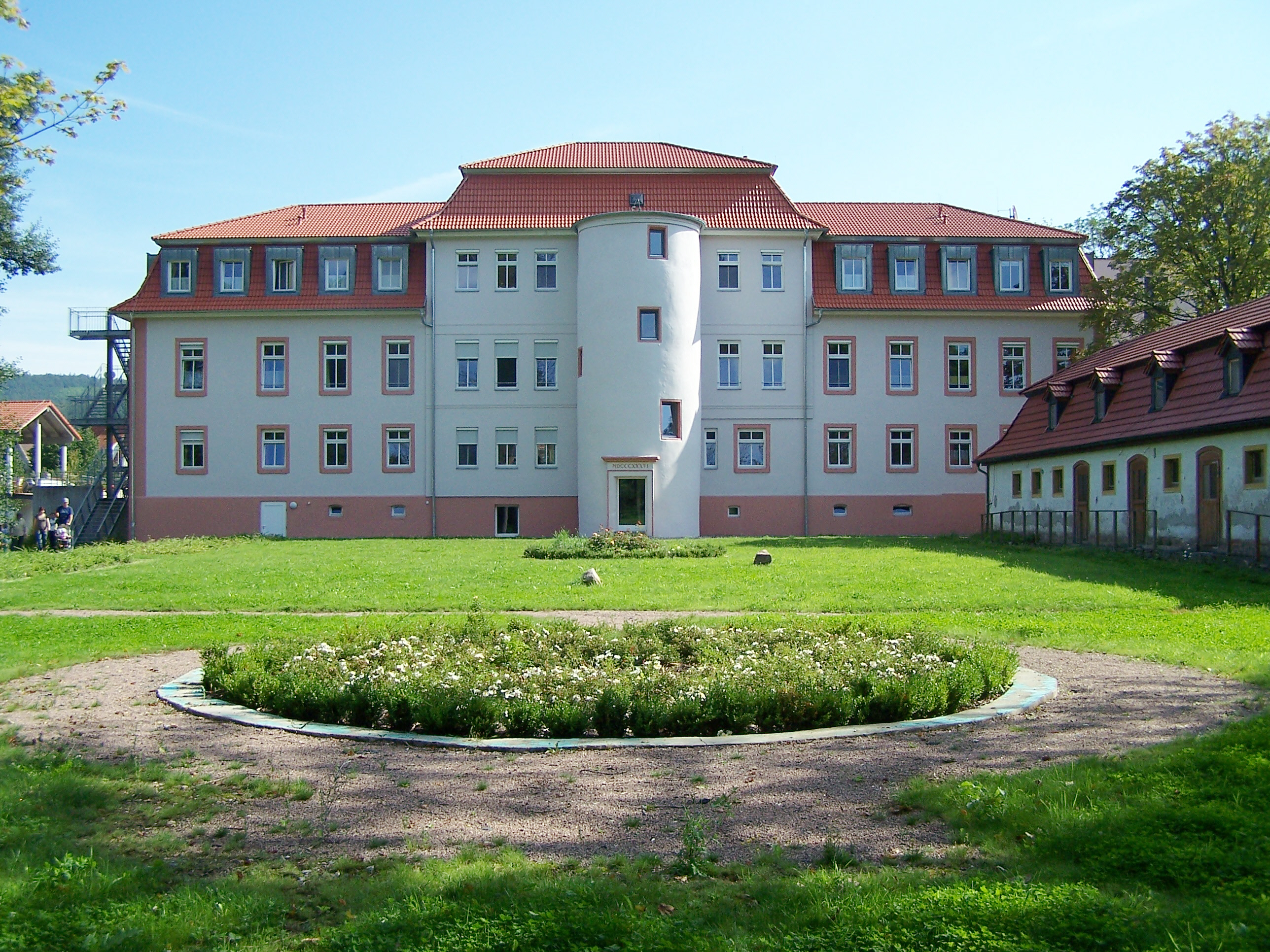 Das Schloss in Weilar (Westfassade).